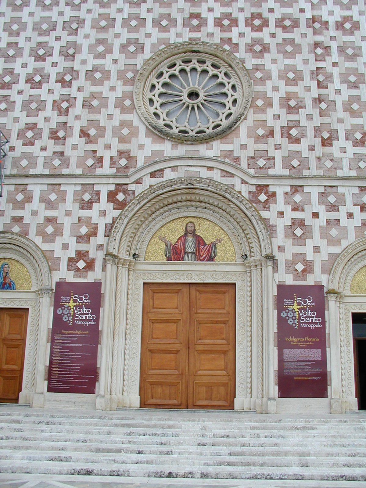 Der Haupteingang der Kirche